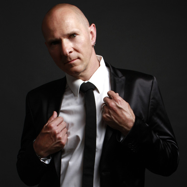 Foto des mehrfach ausgezeichneten Singer/Songwriters und Producer Jörg Dewald, besser bekannt unter dem Namen JD Wood.